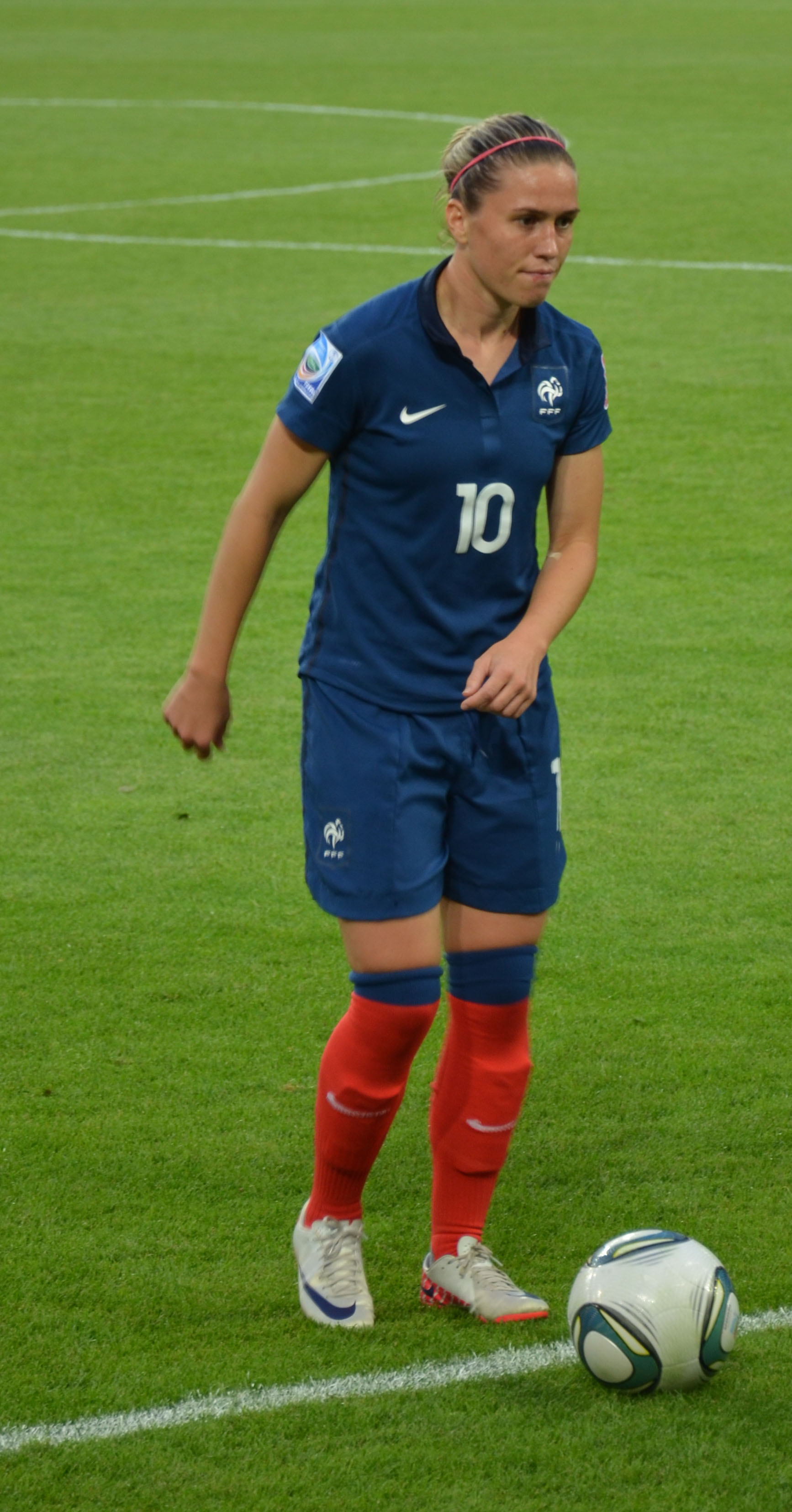 WM Vorrundenspiel zwischen Frankreich und Deutschland am 5. Juli 2011 im Borussiapark in Mönchengladbach